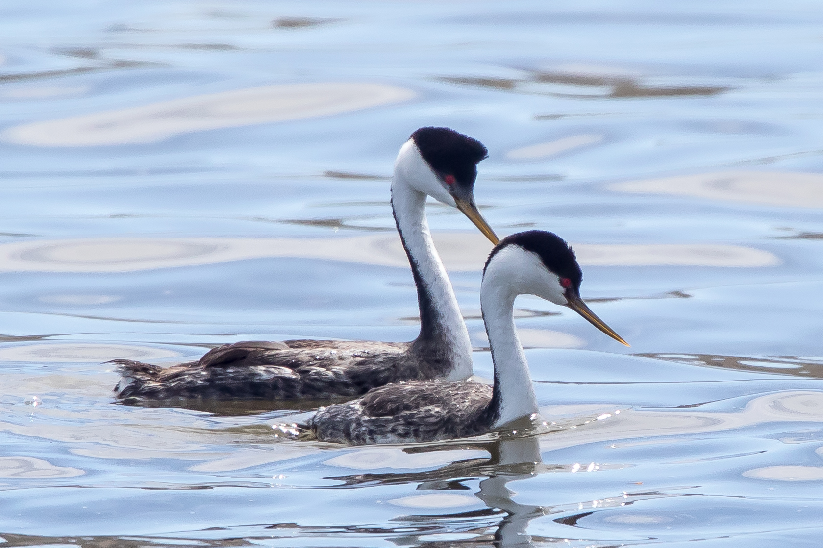 Fruitgrowers Reservoir, Delta County Colorado